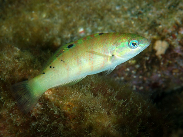 セナスジベラ Thalassoma hardwicke